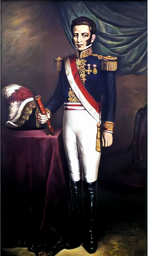 Ya decidido pues por la causa de la independencia, La Mar viajó a la ciudad de Guayaquil a visitar a su familia y, estando allí, la Junta de Guayaquil, de inclinación peruanista, lo nombró en enero de 1822